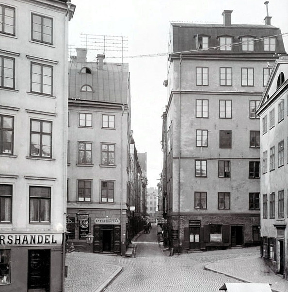 Köpmantorget med Köpmangatan, vy mot väster